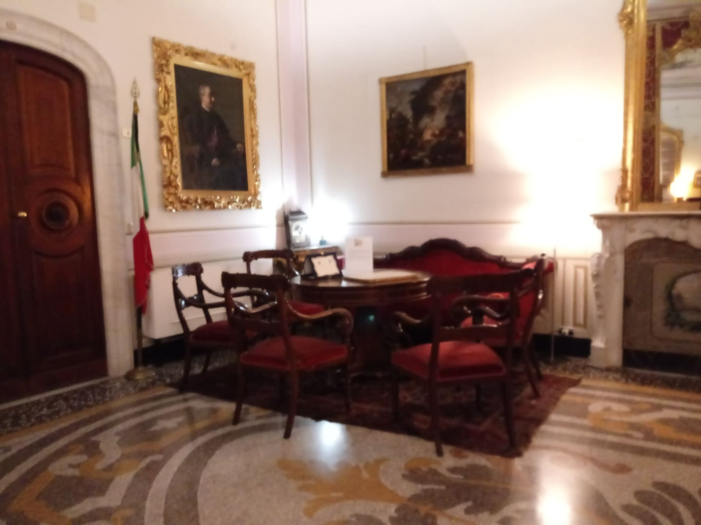 In diesem Raum in der Villa Migone wurde die Kapitulation unterzeichnet. Quelle: Alessio Parisi, ILSREC Istituto Ligure per la Storia della Resistenza e dell'Età Contemporanea, Aufnahme vom April 2019